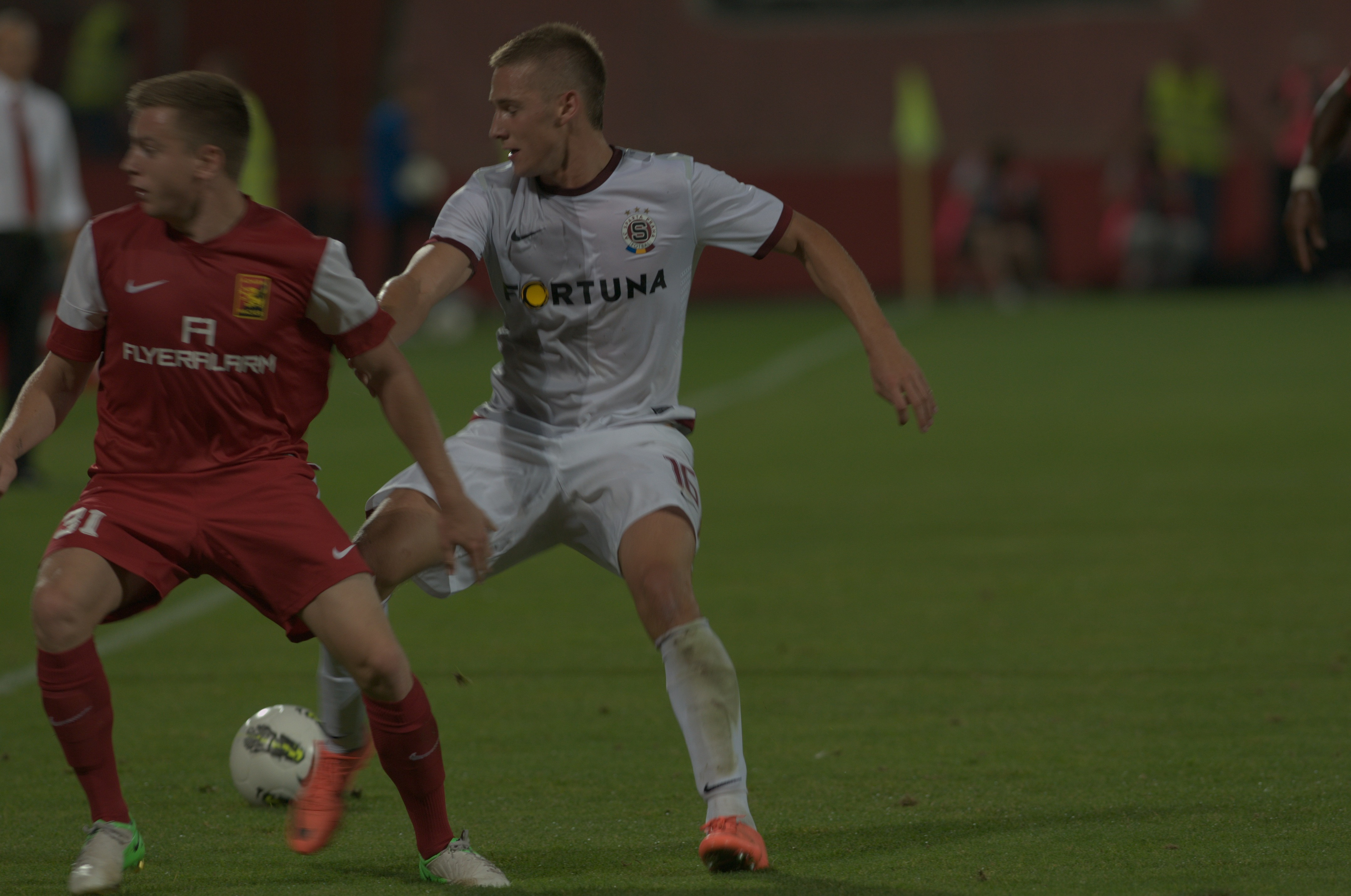 Thomas Weber und Pavel Kadeřábek